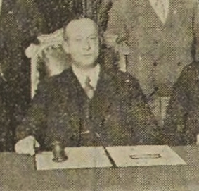 Dhr. W. Rauch Czn. (1881-1939), voormalig voorzitter van de Noordhollandsche Voetbalbond, voetbalscheidsrechter, clubvoorzitter van VV Zeemeeuwen en voorman bij de propagering van de voetbalsport in Noord-Holland.